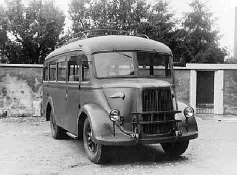 autobus